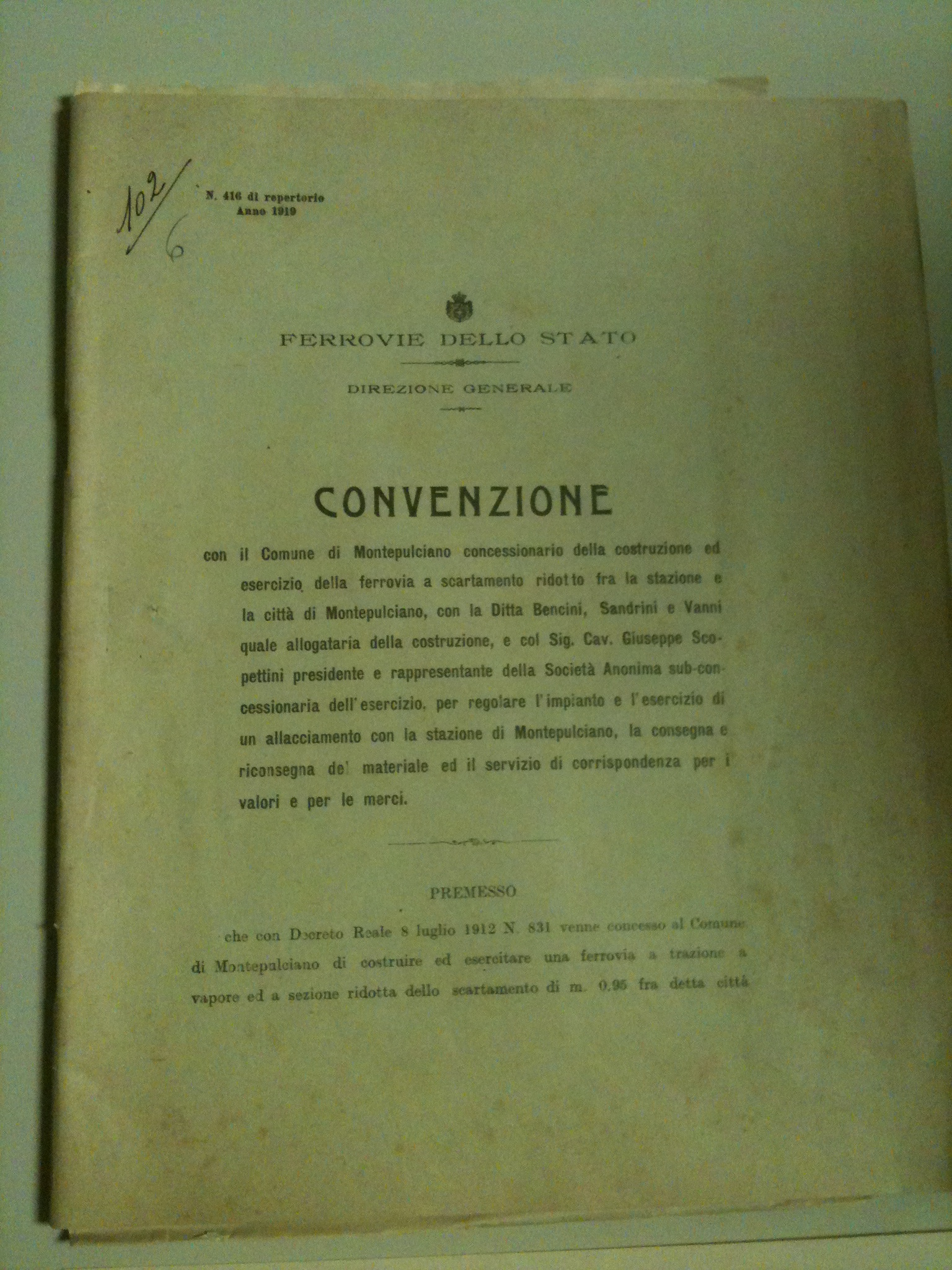 Copertina del volume relativo alla convenzione tra Comune di Montepulciano, la società costruttrice e quella costituita per l'esercizio della ferrovia a scartamento ridotto tra la stazione e la città di Montepulciano. Volume di valore storico locale, proveniente da collezione privata.